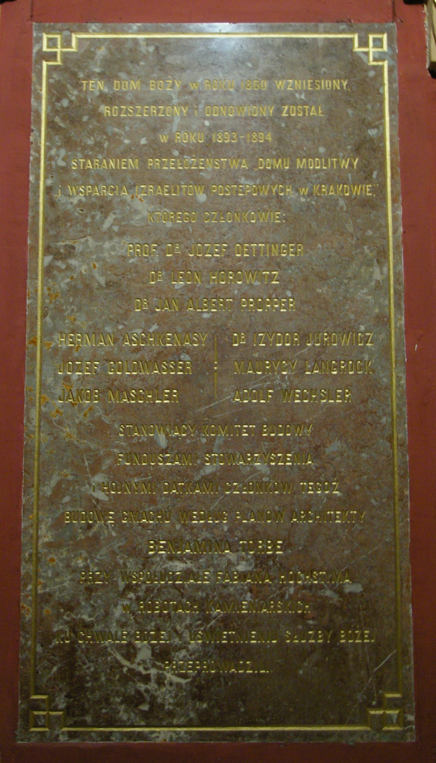 Tablica pamiątkowa w Synagodze Tempel w Krakowie